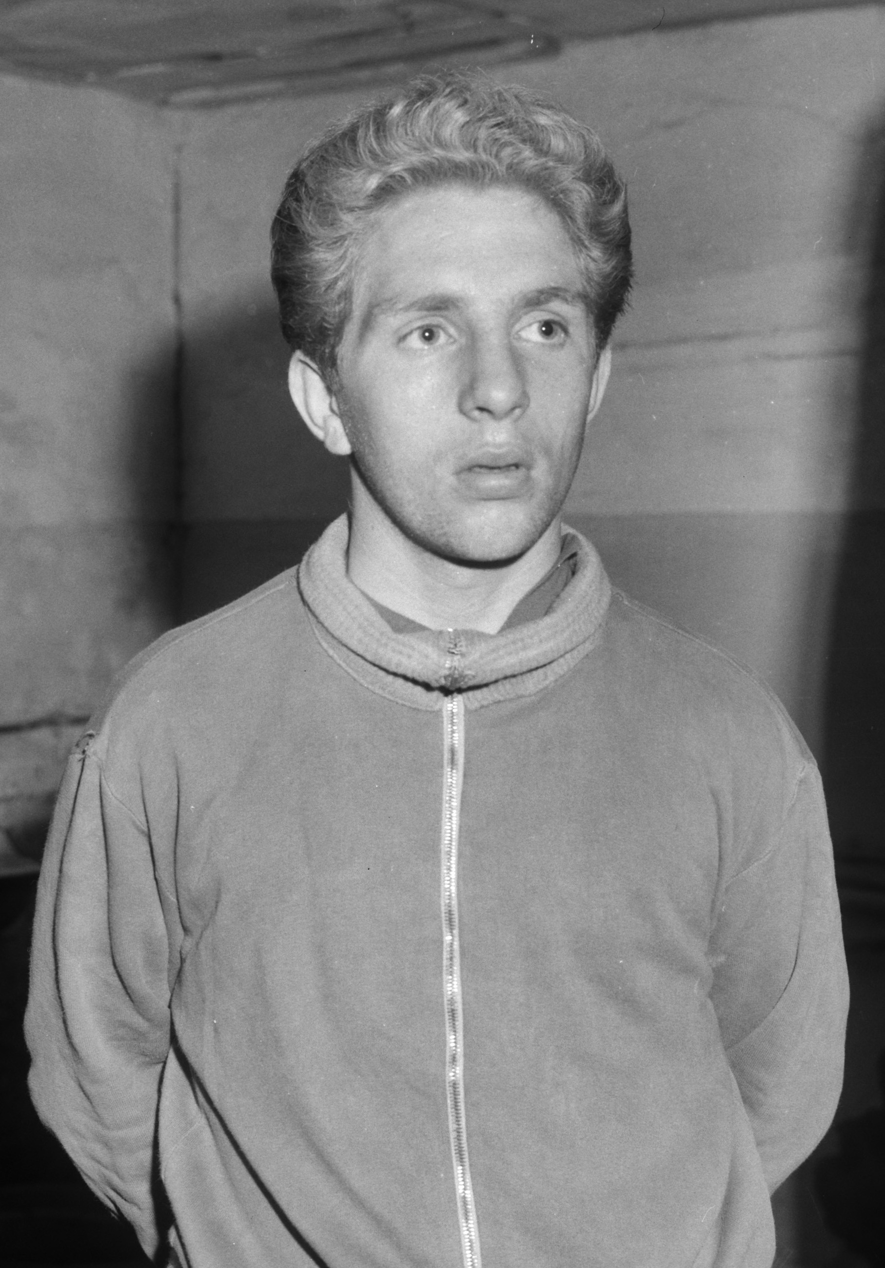 Boksers voor Olympische Spelen 1964 Jan Huppen